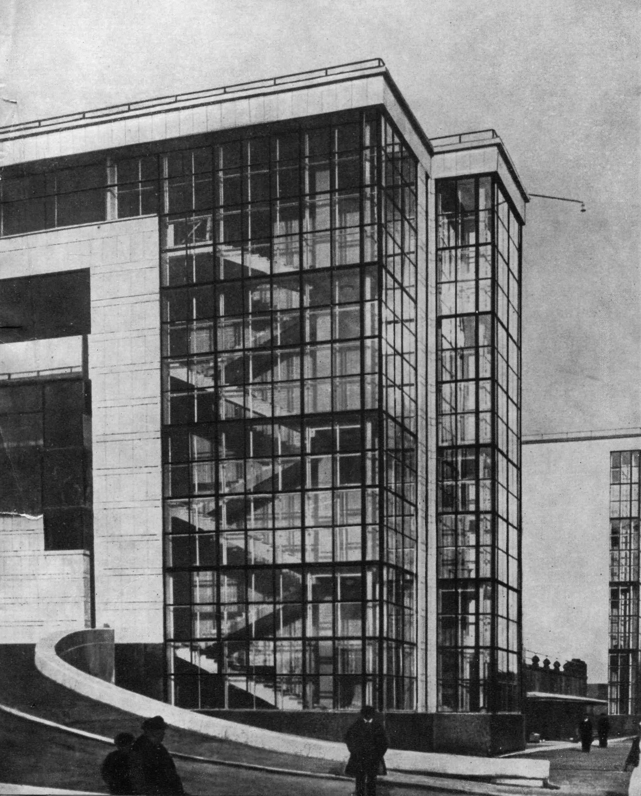 Ростов на Дону. Государственный Областной Драматический Театр им. М. Горького. 1935-1941